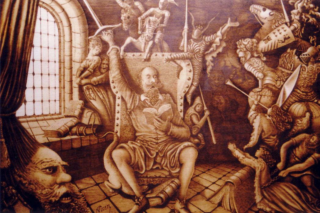 Hallucinations of the Quixote